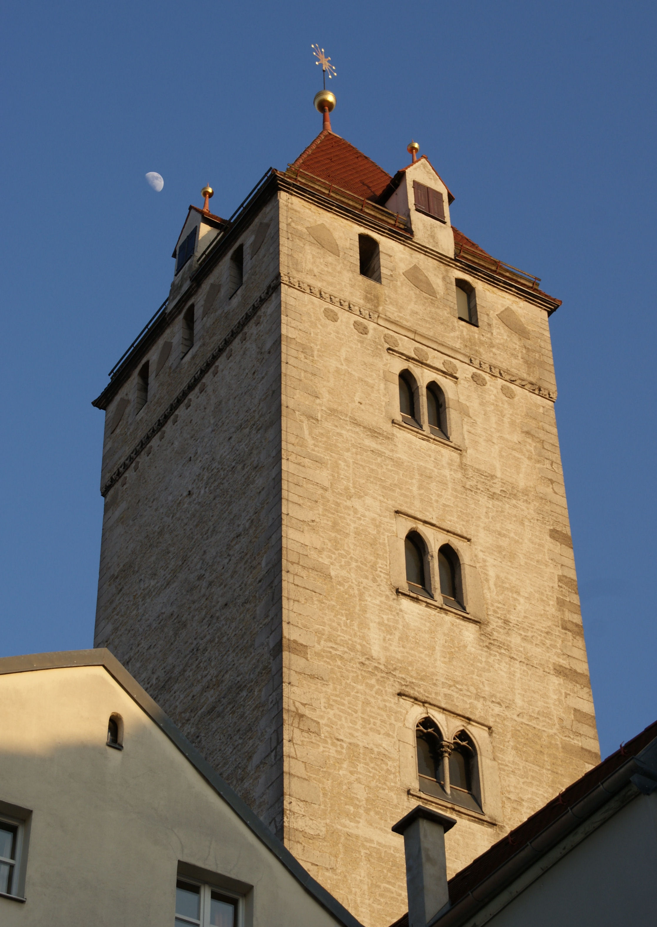 Goldener Turm, Wahlenstraße 16, Regensburg, frühgotischer Hausturm (ab 1250)